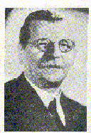 Albert-Chatelet